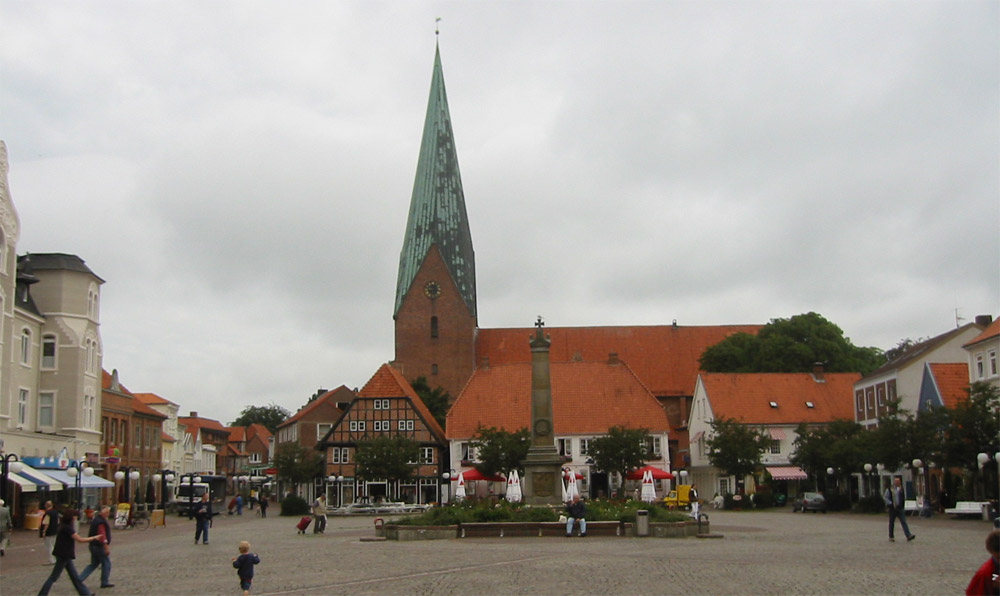 Zentrum Eutin